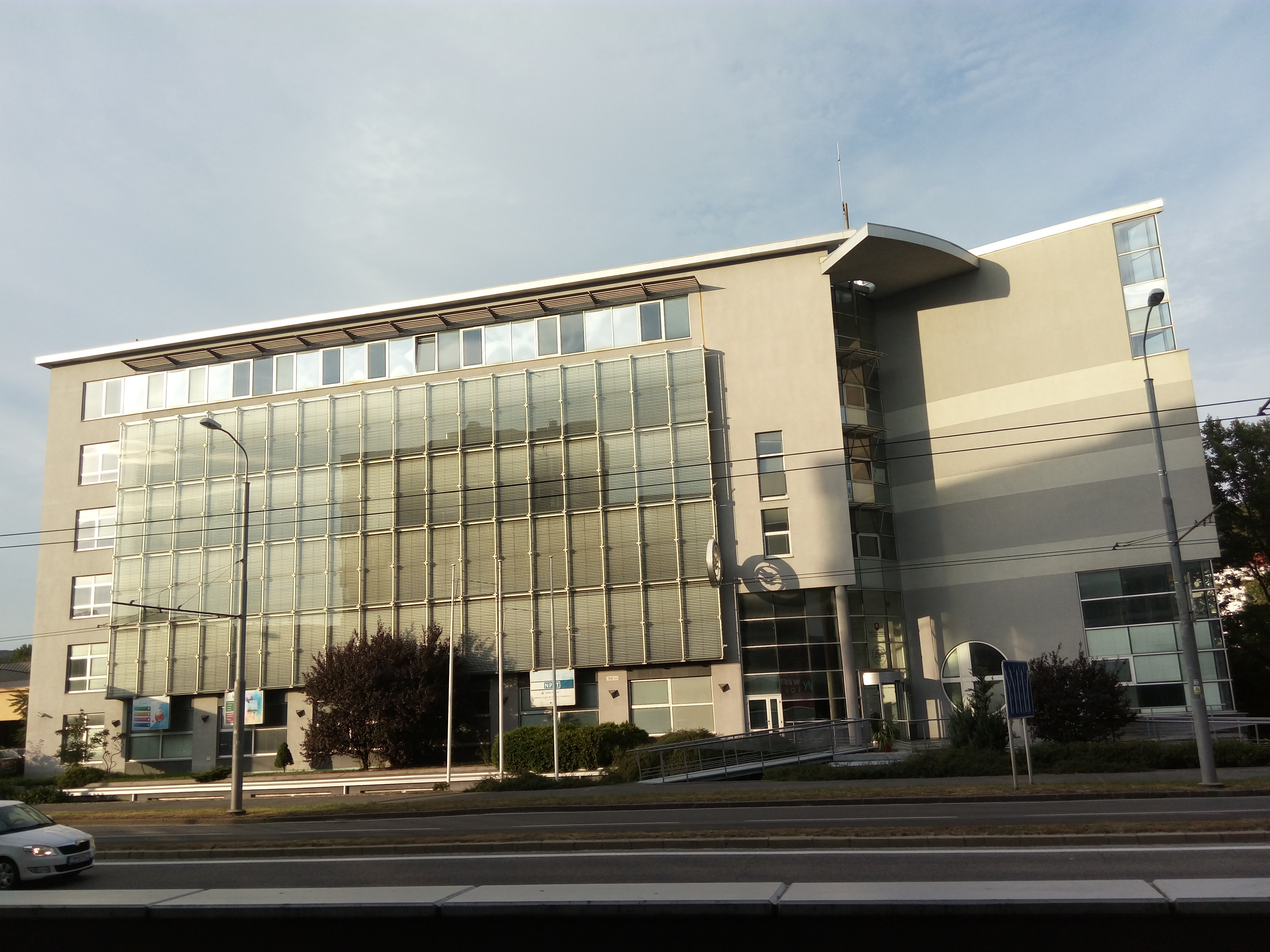 Patrónka, Bratislava